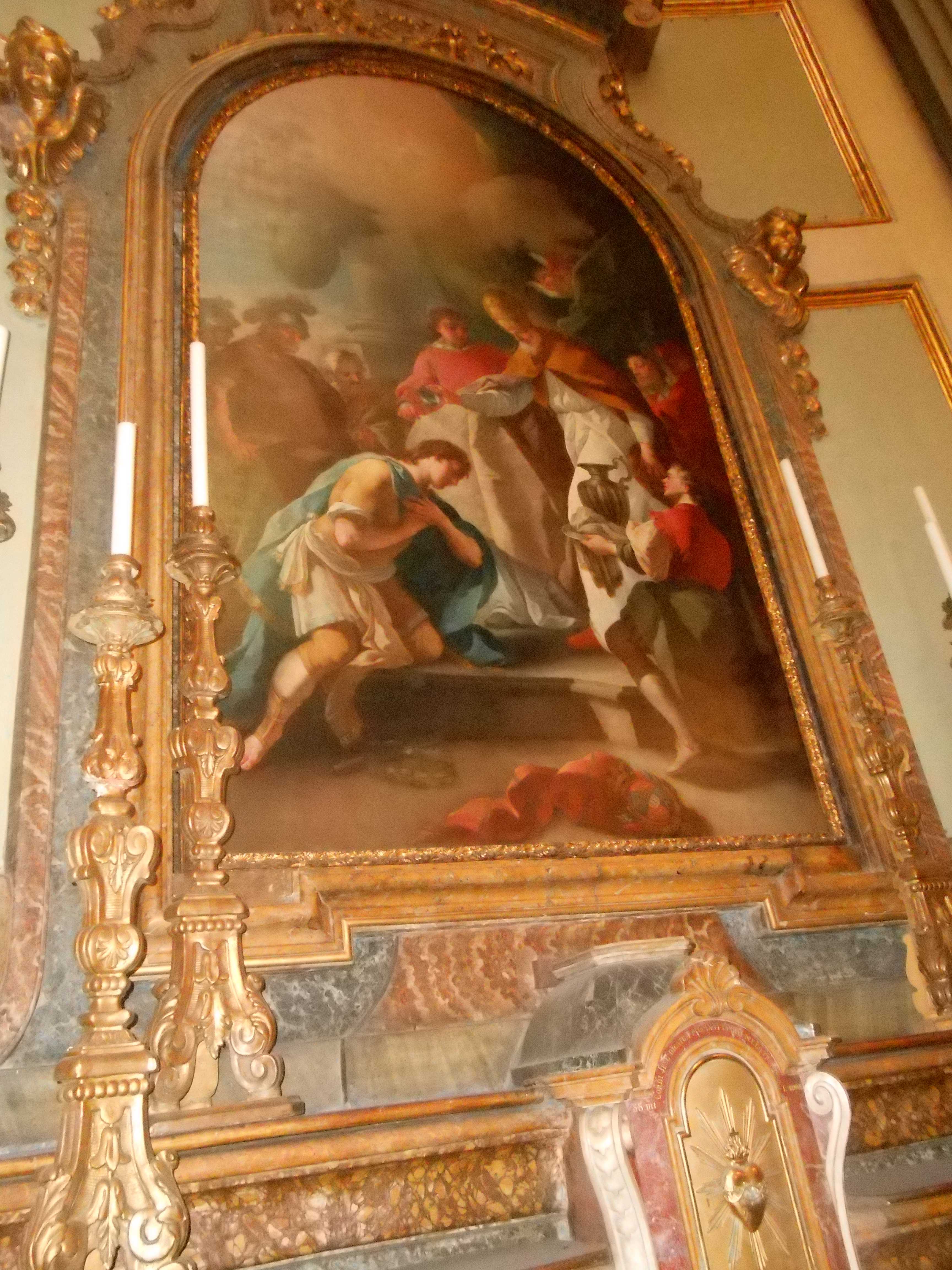 Il battesimo di Costantino nella chiesa del Santo Spirito a Torino.